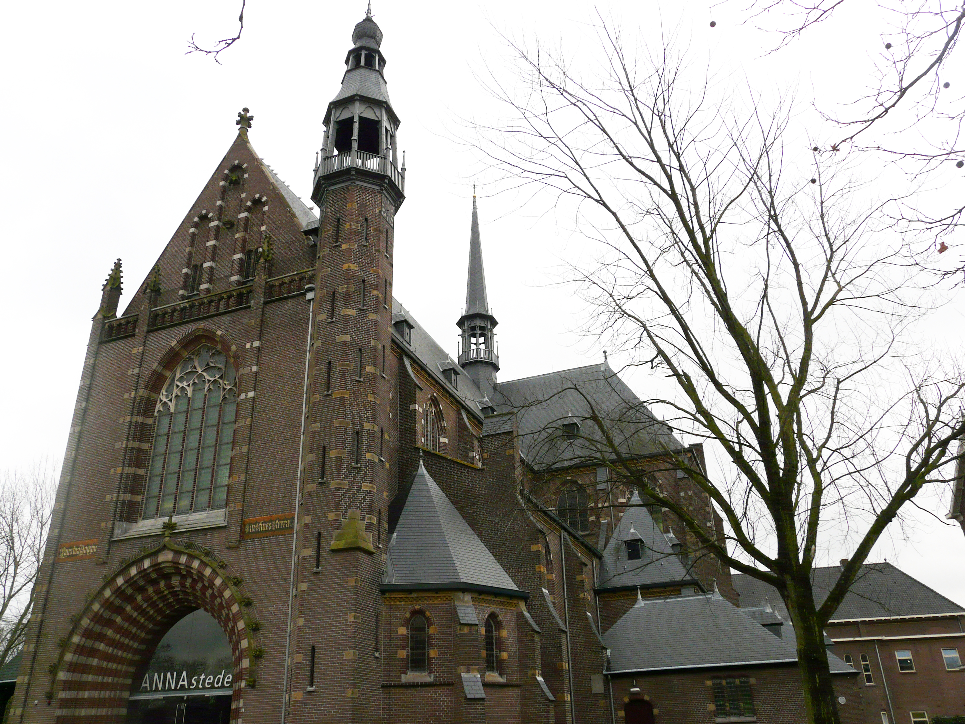 Sint-Annakerk, nu Annastede, in Breda